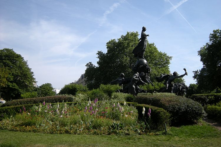 Square de la place de la Nation (Paris) et le « Triomphe de la République » par Dalou